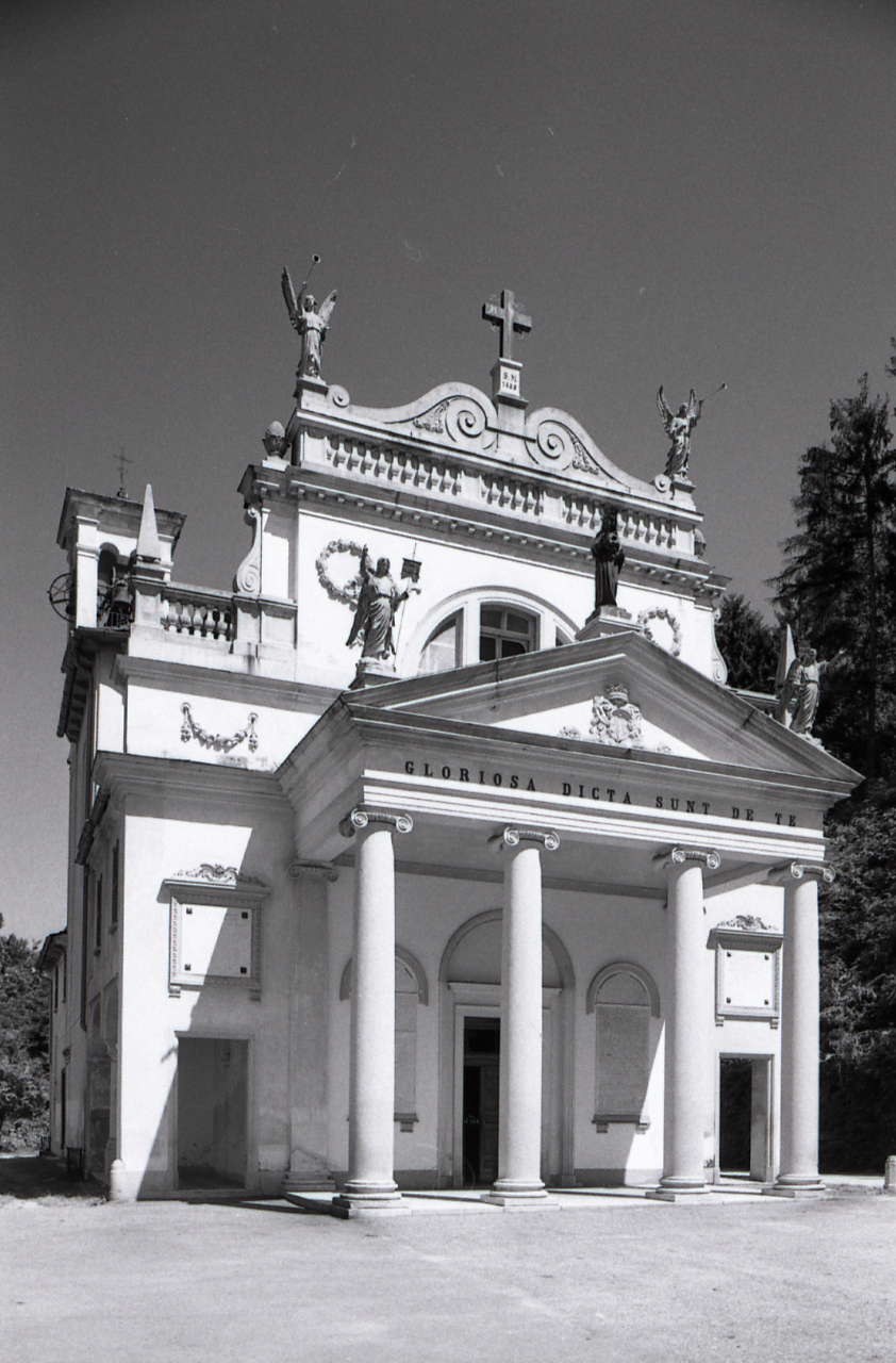 Servizio fotografico : Ameno, 1980 / Paolo Monti. - Strisce: 3, Fotogrammi complessivi: 5 : Negativo b/n, gelatina bromuro d'argento/ pellicola ; 35 mm. - ((Sul portanegativi: [NIKMAT? FP4] e iscrizione "17-8-1980/ Vacciago 19-22 e 34". - Occasione: Documentazione per la pubblicazione: Alberti Luigi, Rainaldi Giancesare, Rizzi Enrico (a cura di), "Elogio del Lago d'Orta", Anzola d'Ossola-Valstrona, Fondazione arch. Enrico Monti-Lo Strona, 1983. - Fonte: Fattura di Paolo Monti: IV. Commesse/ Fattura n. 06/ Riprese fotografiche città di Orta e Lago d'Orta (1982/04/10), presso Archivio Paolo Monti. N. 450 fotografie formato 24x30. - Fonte: Monografia di Alberti Luigi, Rainaldi Giancesare, Rizzi Enrico: Elogio del Lago d'Orta, Anzola d'Ossola-Valstrona, Fondazione arch. Enrico Monti-Lo Strona (1983). Alberti Luigi, Rainaldi Giancesare, Rizzi Enrico (a cura di). - Fonte: Fattura di Paolo Monti: IV. Commesse/ Fattura n. 10/ Riprese fotografiche Lago d'Orta, Valstrona e Val d'Ossola (1982/05/08), presso Archivio Paolo Monti. N. 650 fotografie formato 24x30